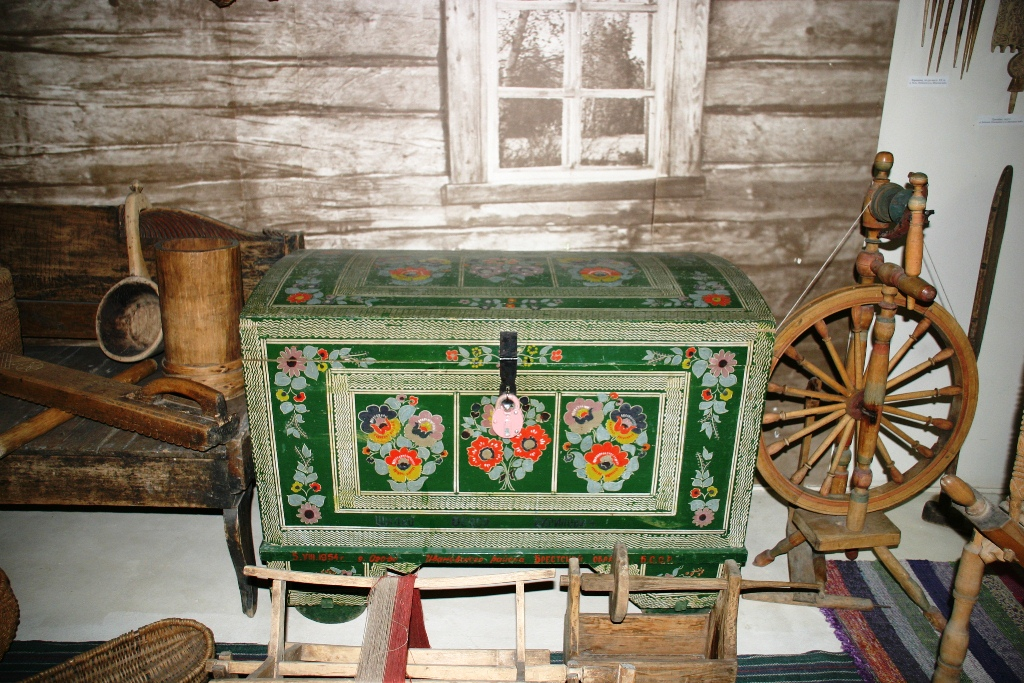 Old Belarusian History Museum Native nameМузей старажытнабеларускай культурыLocationMinsk, BelarusCoordinates53° 55′ 00″ N, 27° 36′ 10″ E Established1977Website control : Q6511262